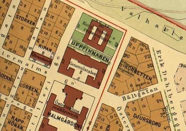 Del av 1930 års karta över Stockholm visande Patent- och registreringsverkets byggnad i kvarteret Uppfinnaren